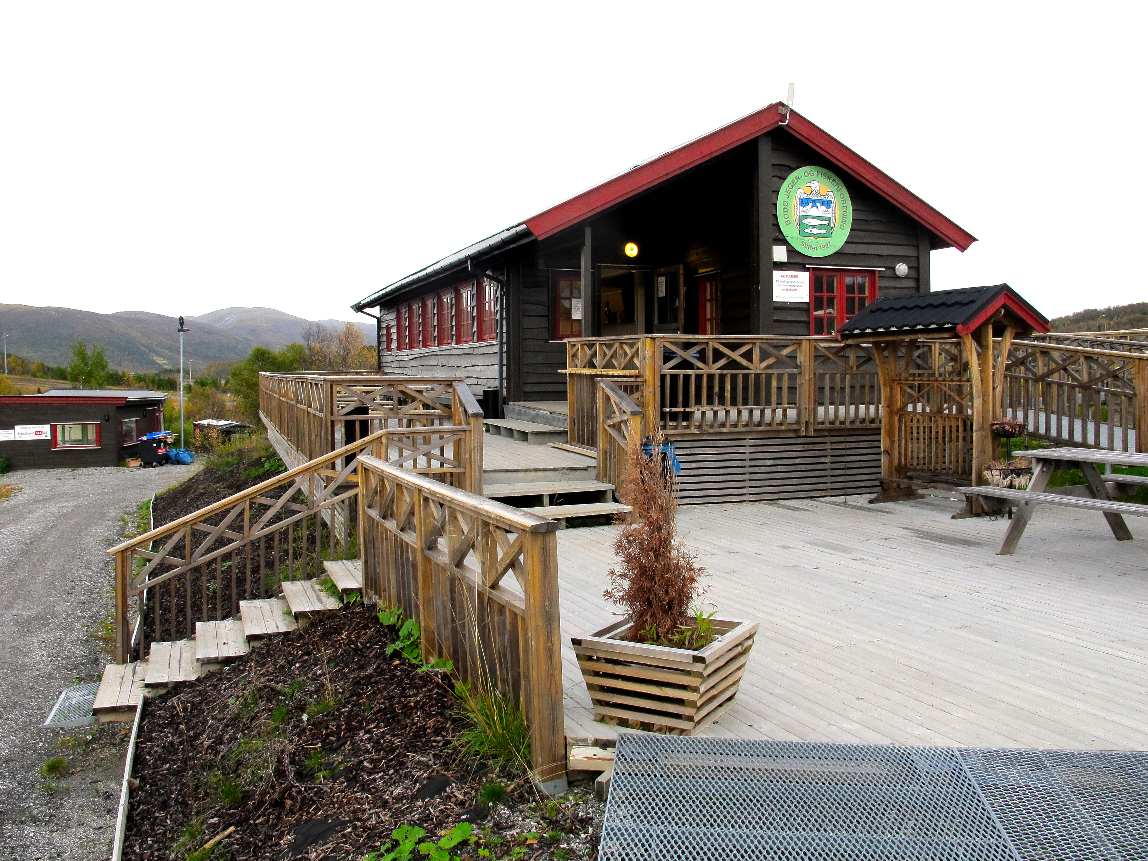 Klubbhuset